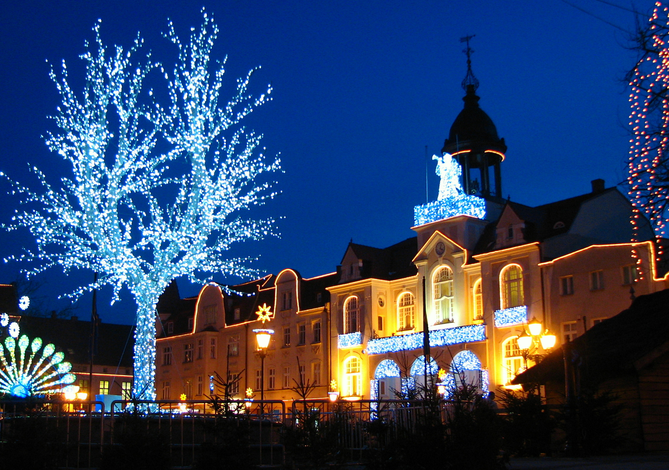 Świąteczne oświetlenie wejherowskiego rynku